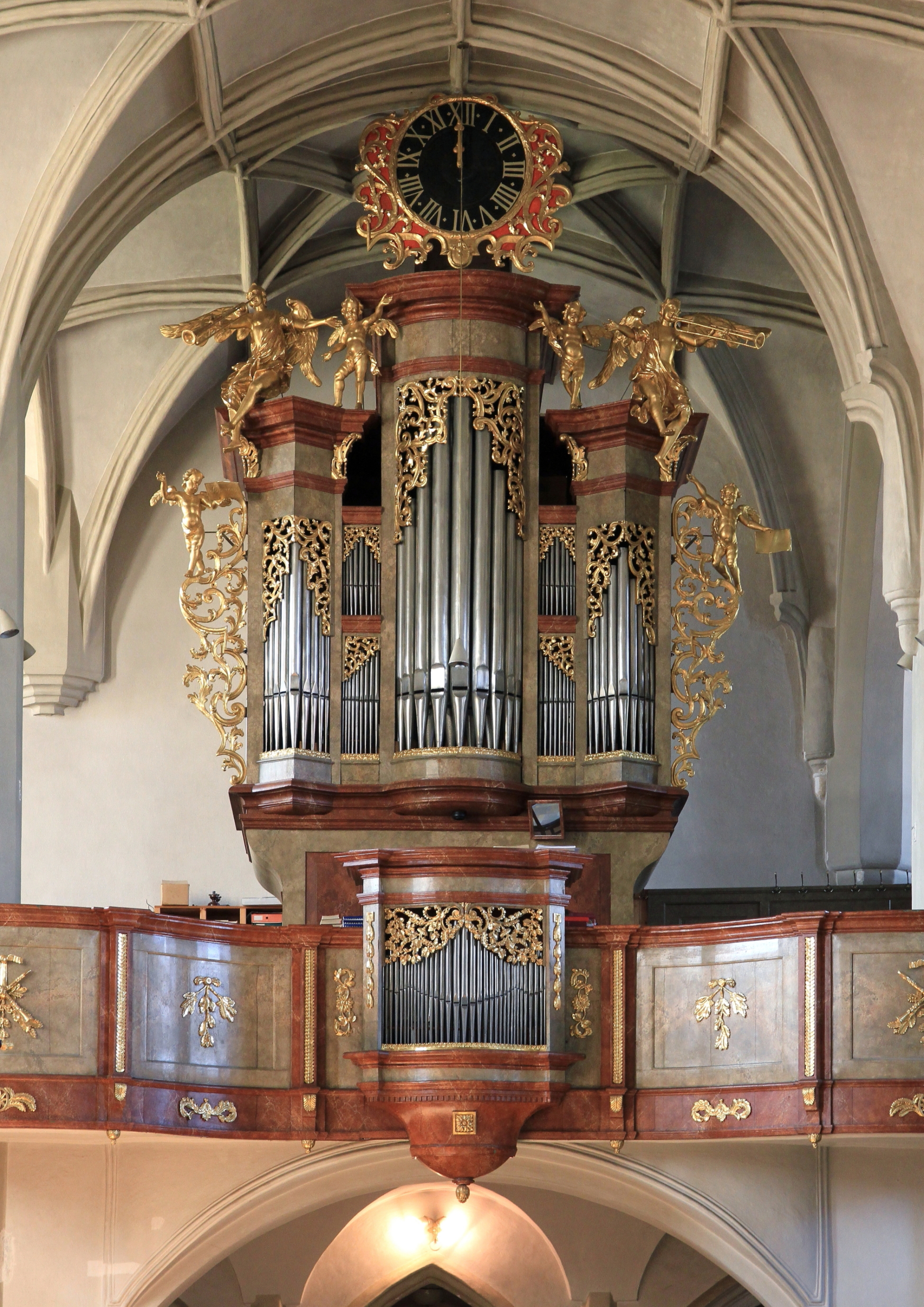 Orgel der katholischen Pfarrkirche hl. Petrus in der niederösterreichischen Marktgemeinde Purgstall. Eine spätbarocke Orgel aus dem Jahr 1792 von Ignaz Gatto der Jüngere. Die Orgel wurde 1884 umgebaut und 1980 durch Gerhard Hradetzky wiederhergestellt.